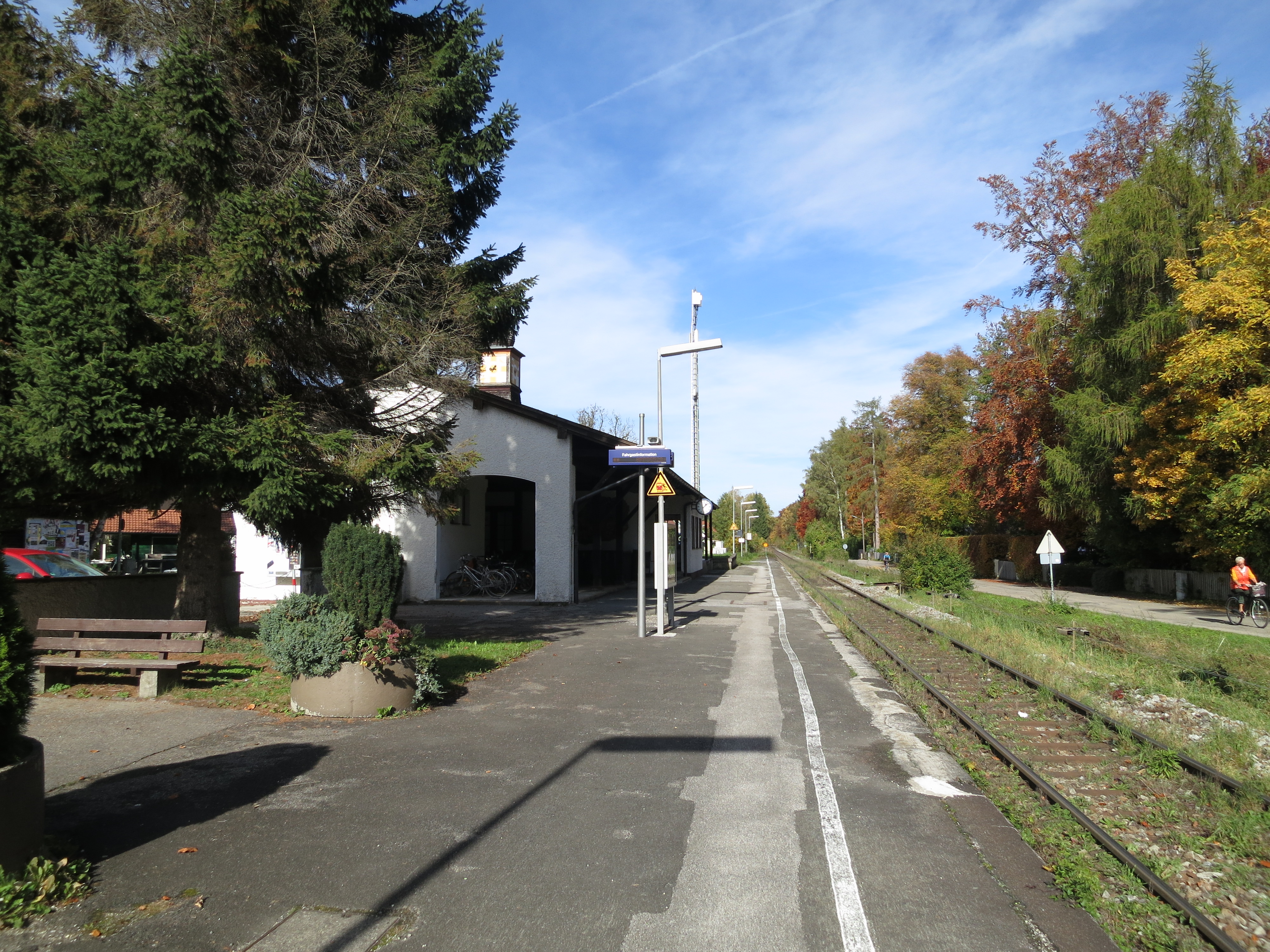 Hausbahnsteig und Gleisseite des Empfangsgebäudes am Bahnhof Riederau an der Ammerseebahn